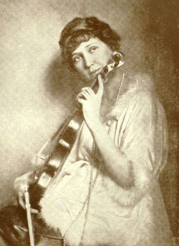 Marta Linz, deutsche ungarische Geigerin und Dirigentin (1898-1982)